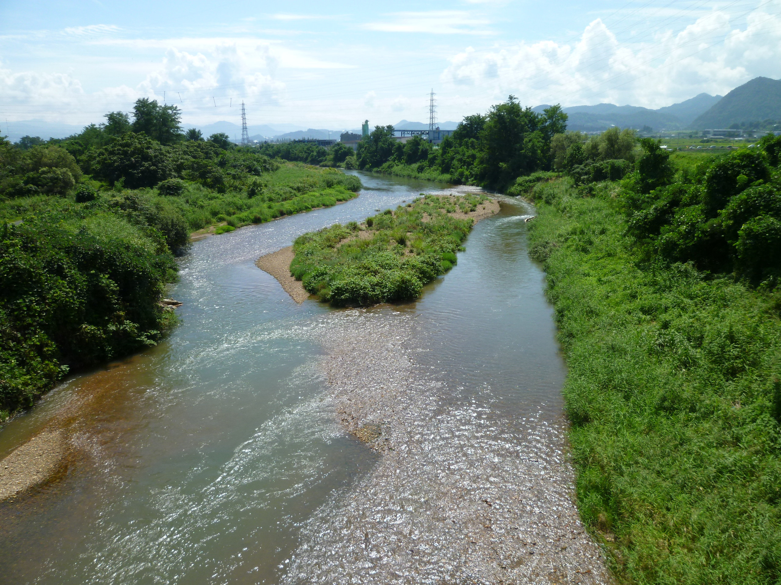 須川（飯塚橋より上流方向）